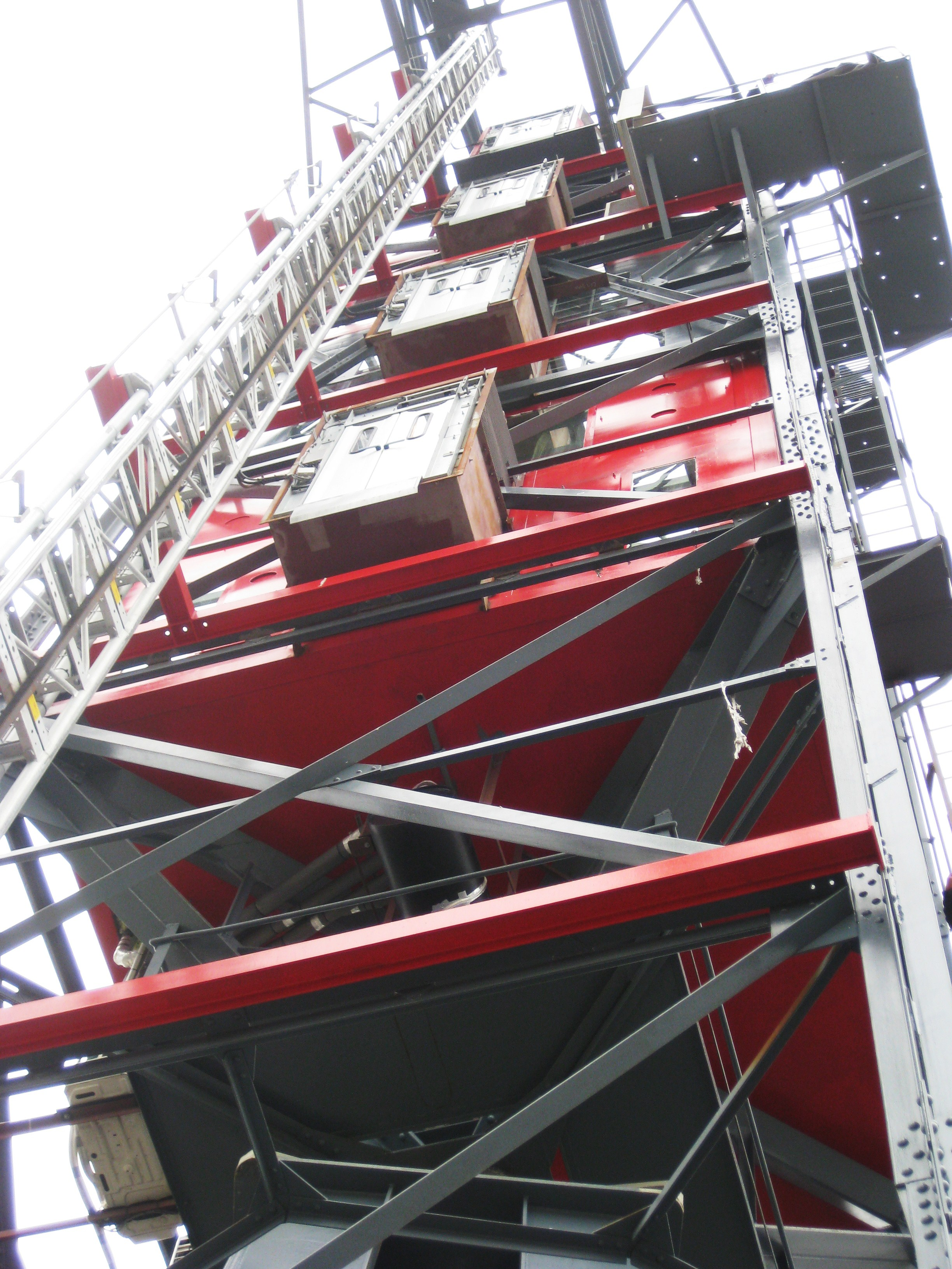 De hotelsuites in de kraan van het Faralda Kraan Hotel in Amsterdam-Noord op het NDSM terrein